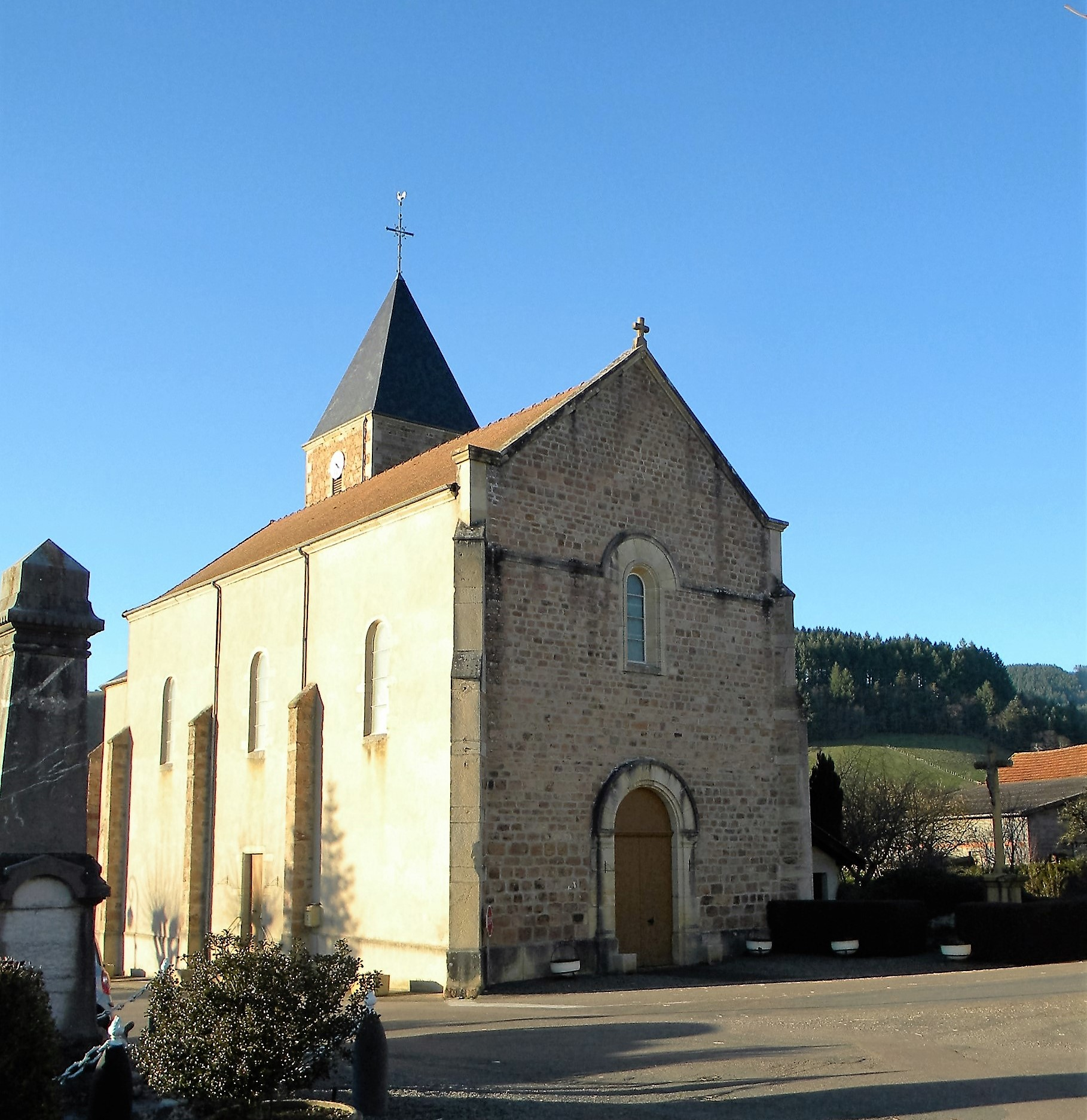 L'église